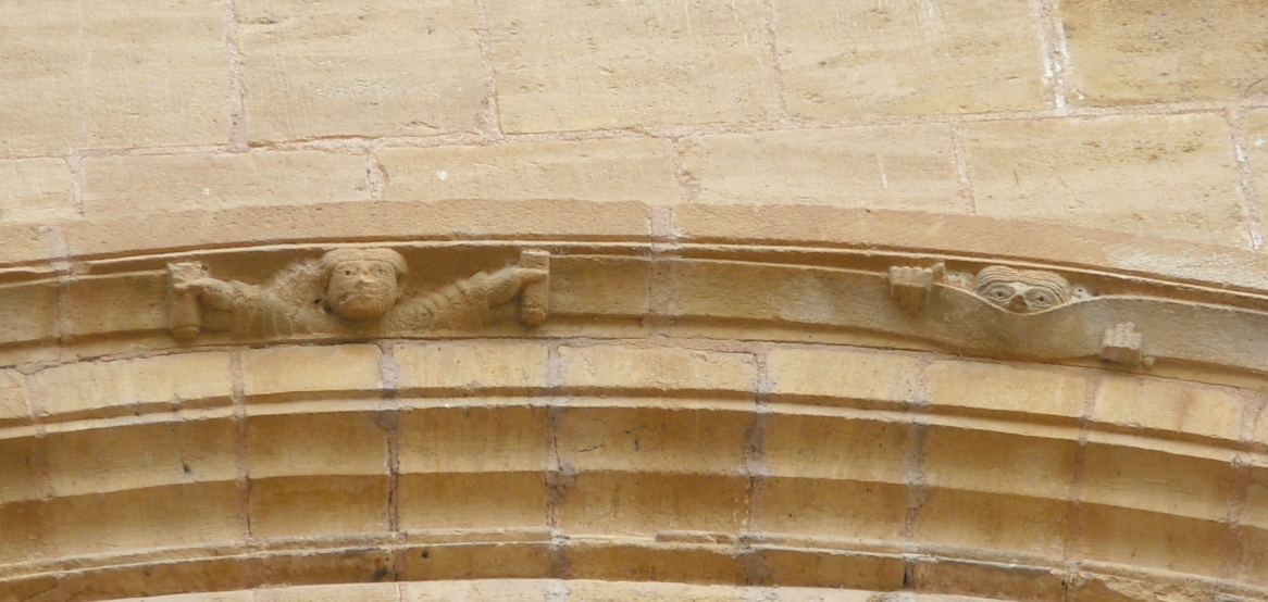 Oeuvre particulière du sculpteur